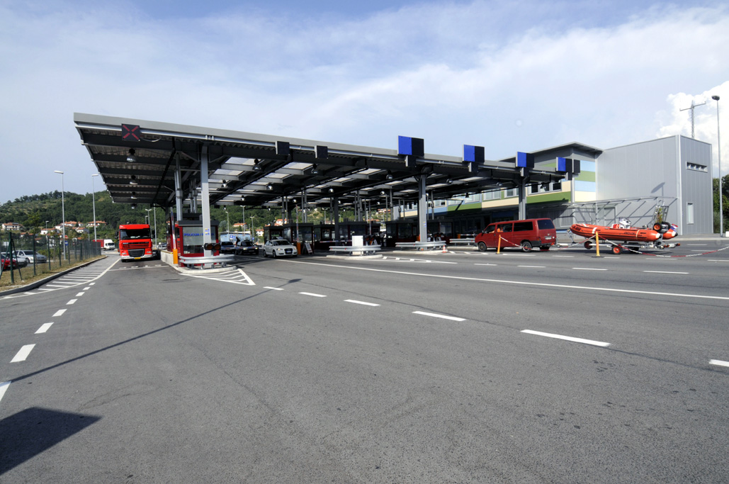 Mednarodni mejni prehod Dragonja na meji med Slovenijo in Hrvaško